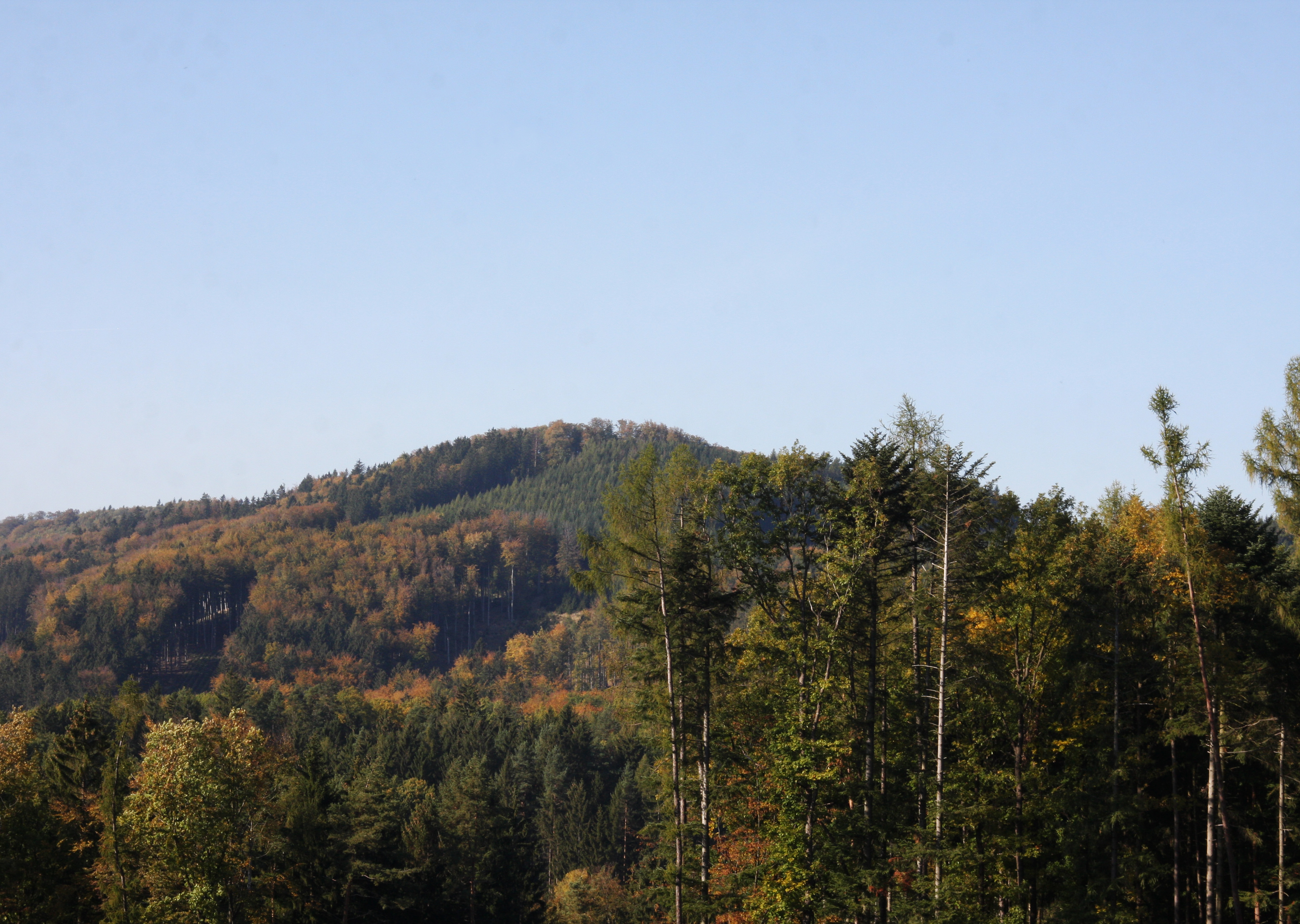 Kopec Bzová, na němž se nahází Přírodní památka Bzová